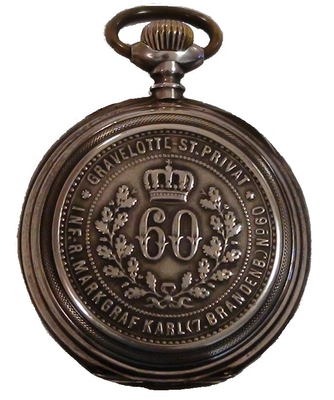 Taschenuhr eines Angehörigen des Infanterie-Regiments 60, mit Erinnerung an Schlacht von Gravelotte. Uhr von vor 1914.